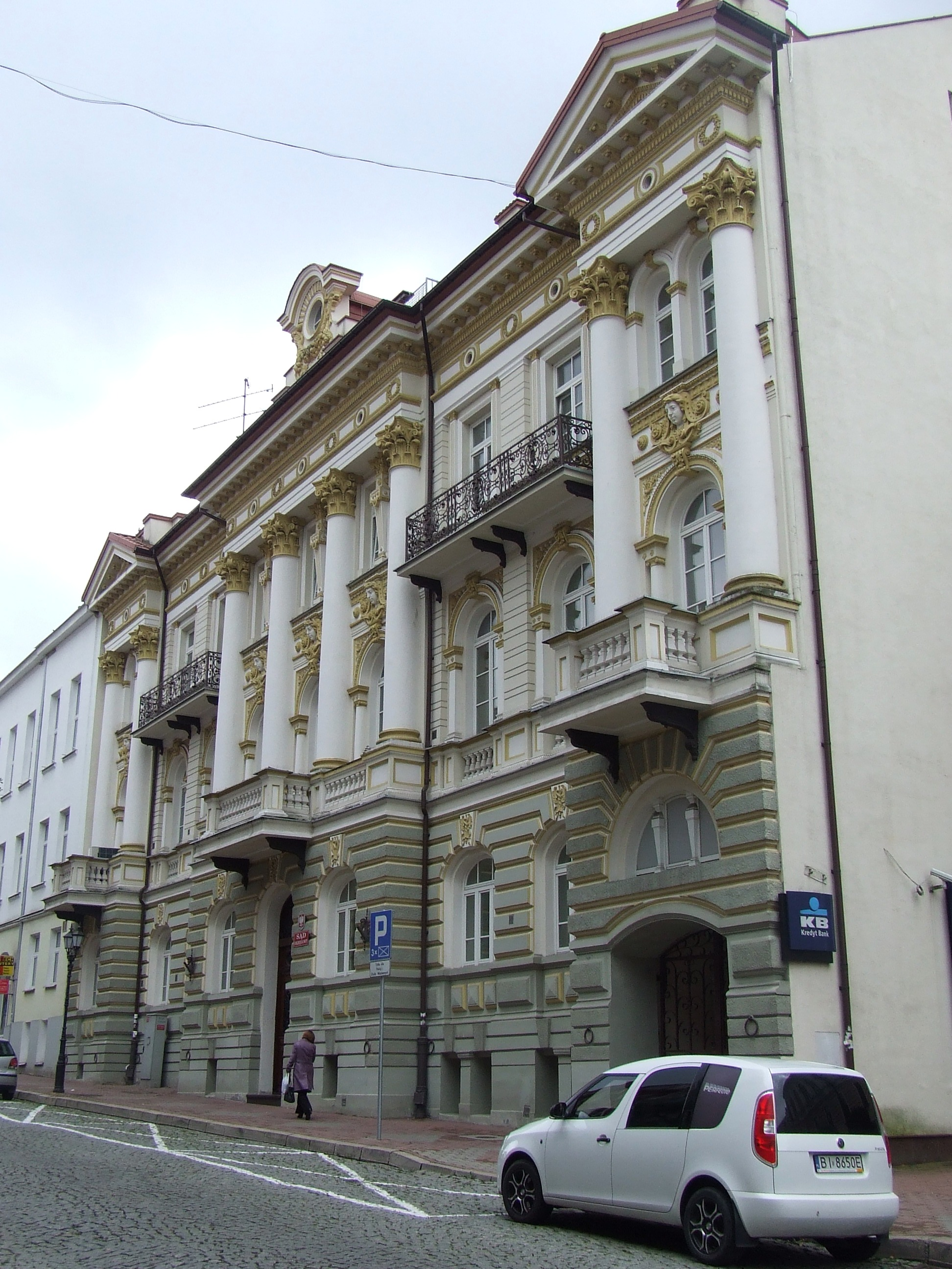 Łomża, ul. Dworna 16 - budynek dawnej "Kasy Przemysłowej" (zabytek nr A-205 z 5.11.1985)